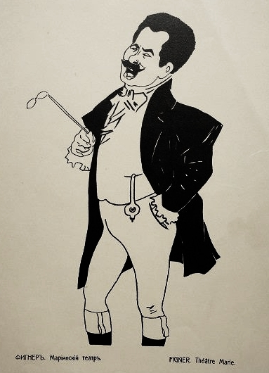 Русский оперный певец Николай Николаевич Фигнер на карикатуре Поля Робера из альбома «Весь Петербург в карикатурах»